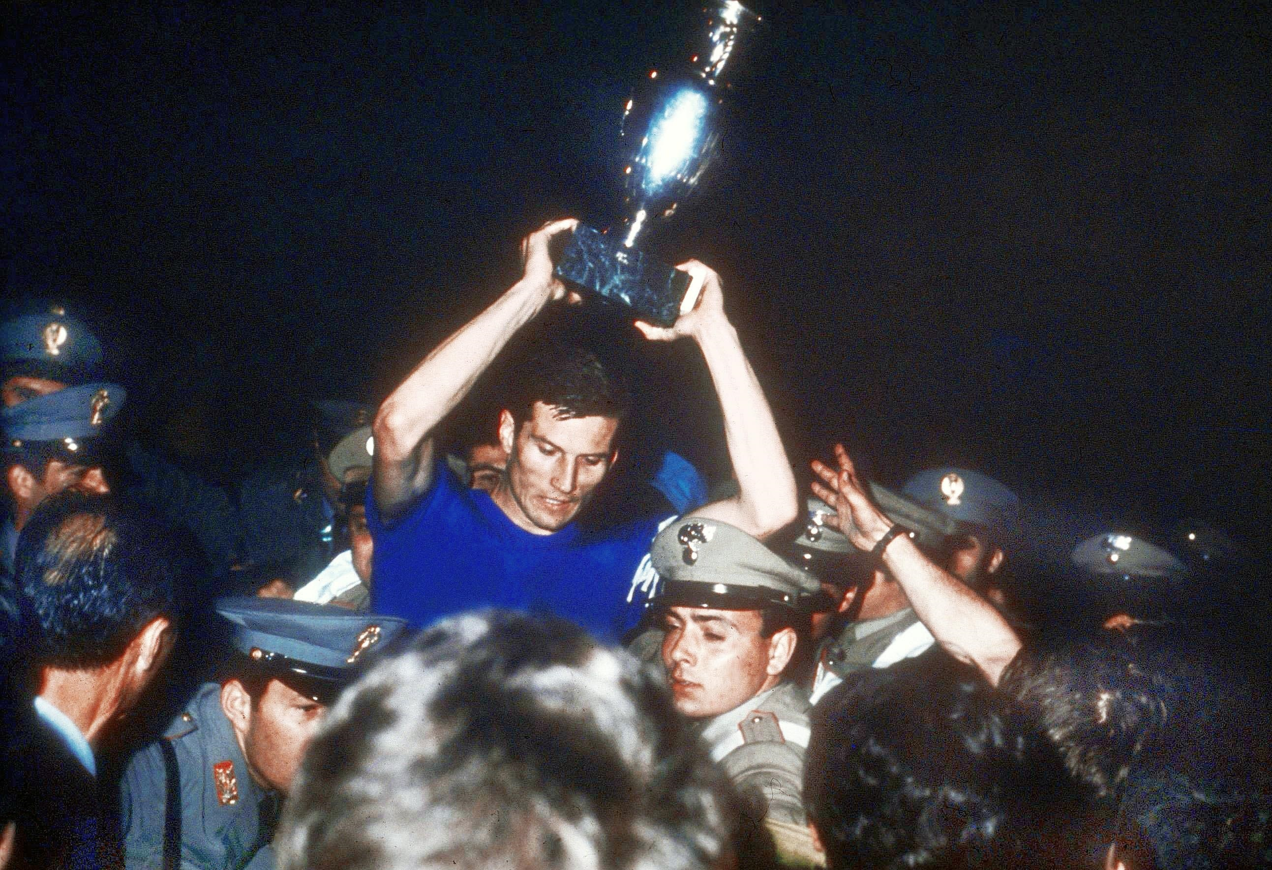 Roma, stadio Olimpico, 10 giugno 1968. Il capitano italiano Giacinto Facchetti solleva la Coppa Henri Delaunay al termine della vittoriosa ripetizione della finale del campionato d'Europa 1968 tra Italia e Jugoslavia (2-0).